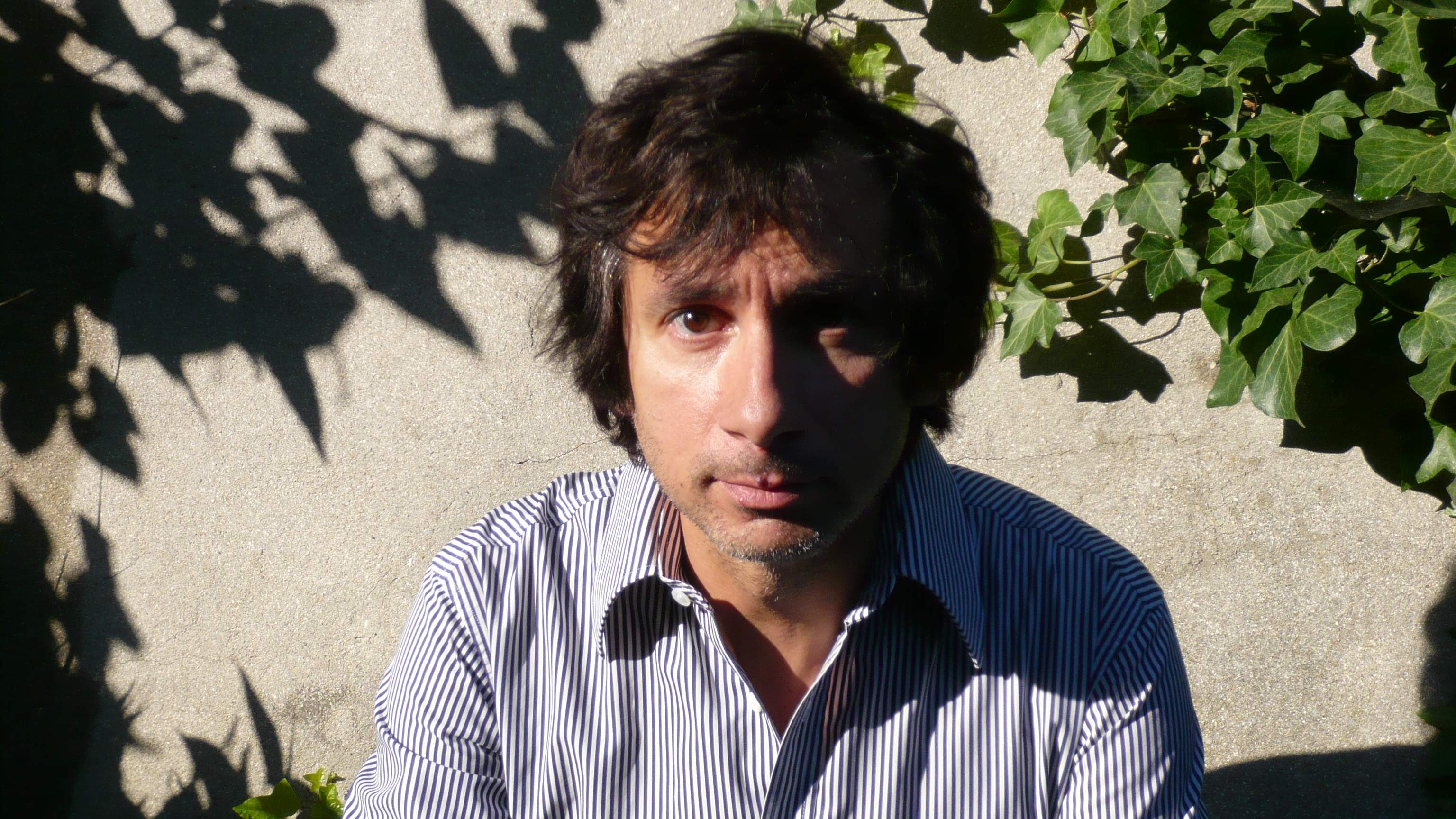 Photo de Nicolas Errèra, compositeur